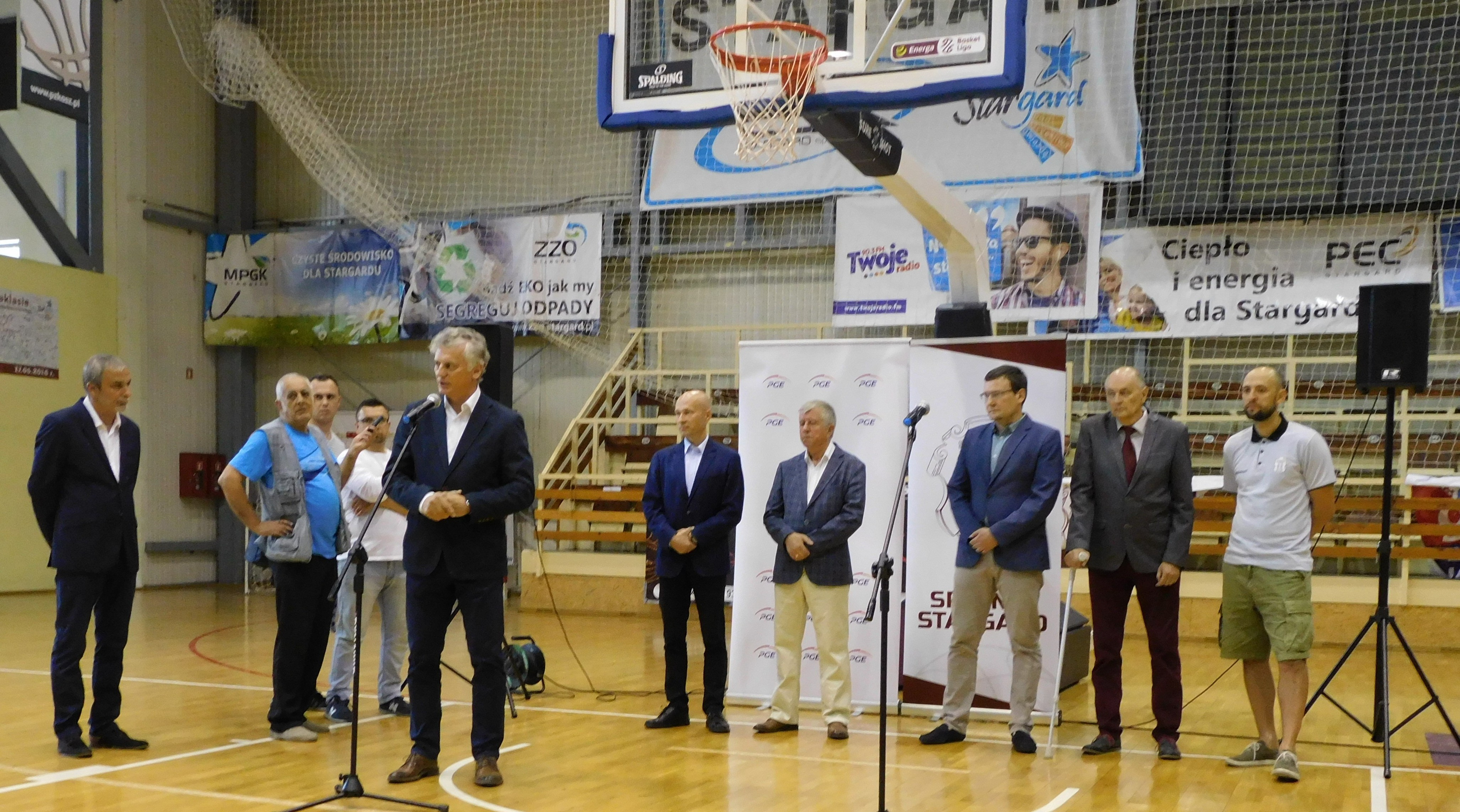 Konferencja prasowa Stargard 21.06.2019